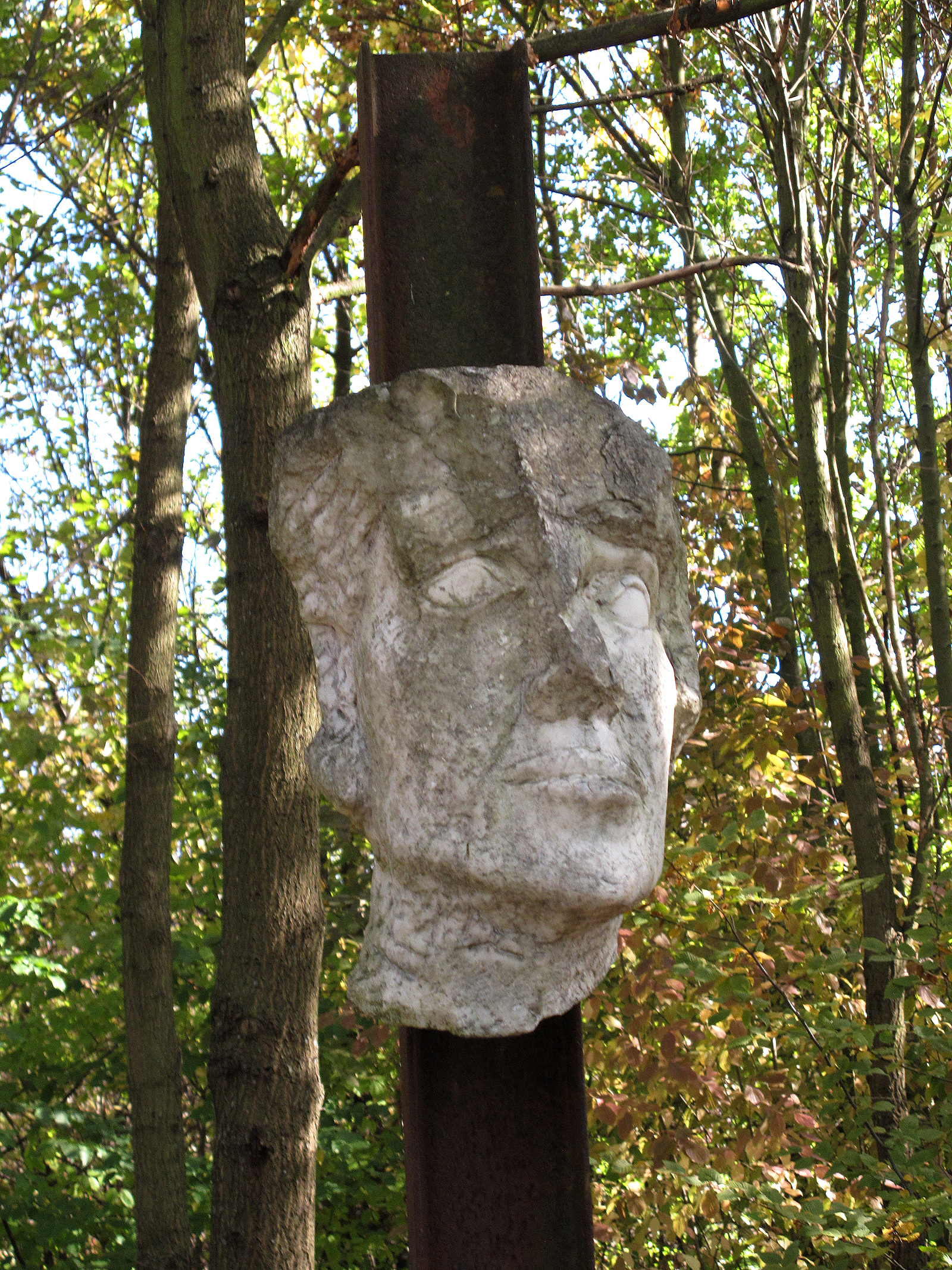 Hans Daniel Sailer (Entwurf) und weitere Künstler einer Bauhütte, Friedensmahnmal, - Ensemblestück 5, Blutrinne und Stele mit Marmorkopf, - Deutschland, Baden-Württemberg, Leonberg, Stadtpark